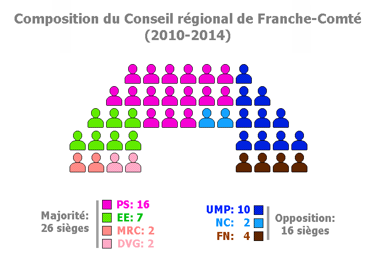 Graphique de la composition (par partis) du conseil régional de Franche-Comté pour la session 2010-2014.